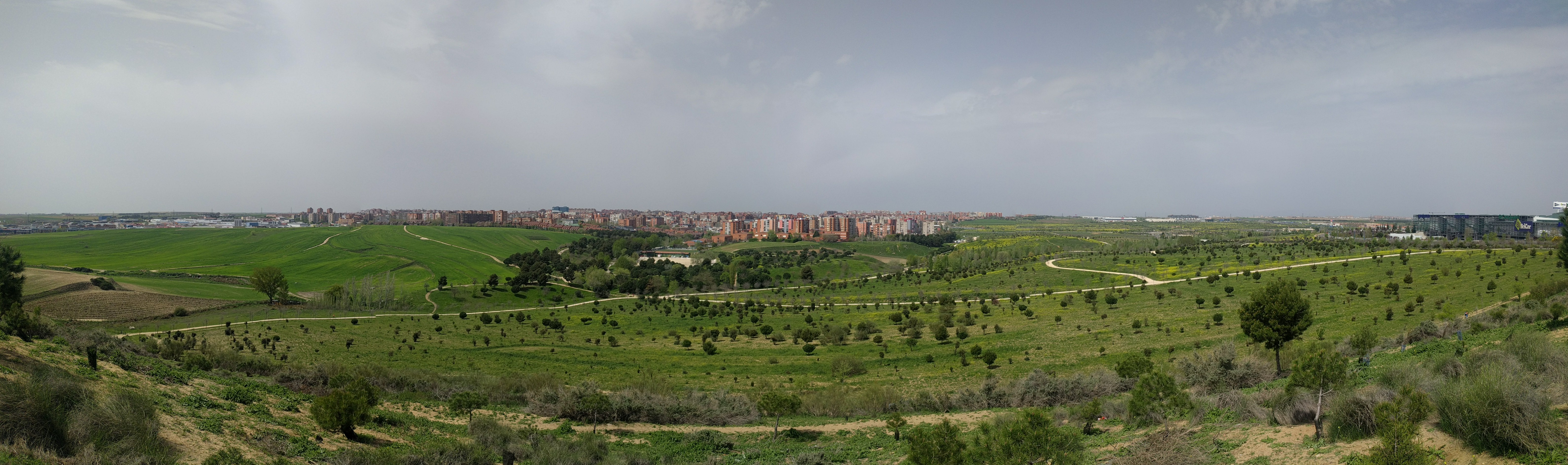 Panorámica de Bosque Sur (Fuenlabrada, Madrid, España) desde el mirado de las roturas del Culebro